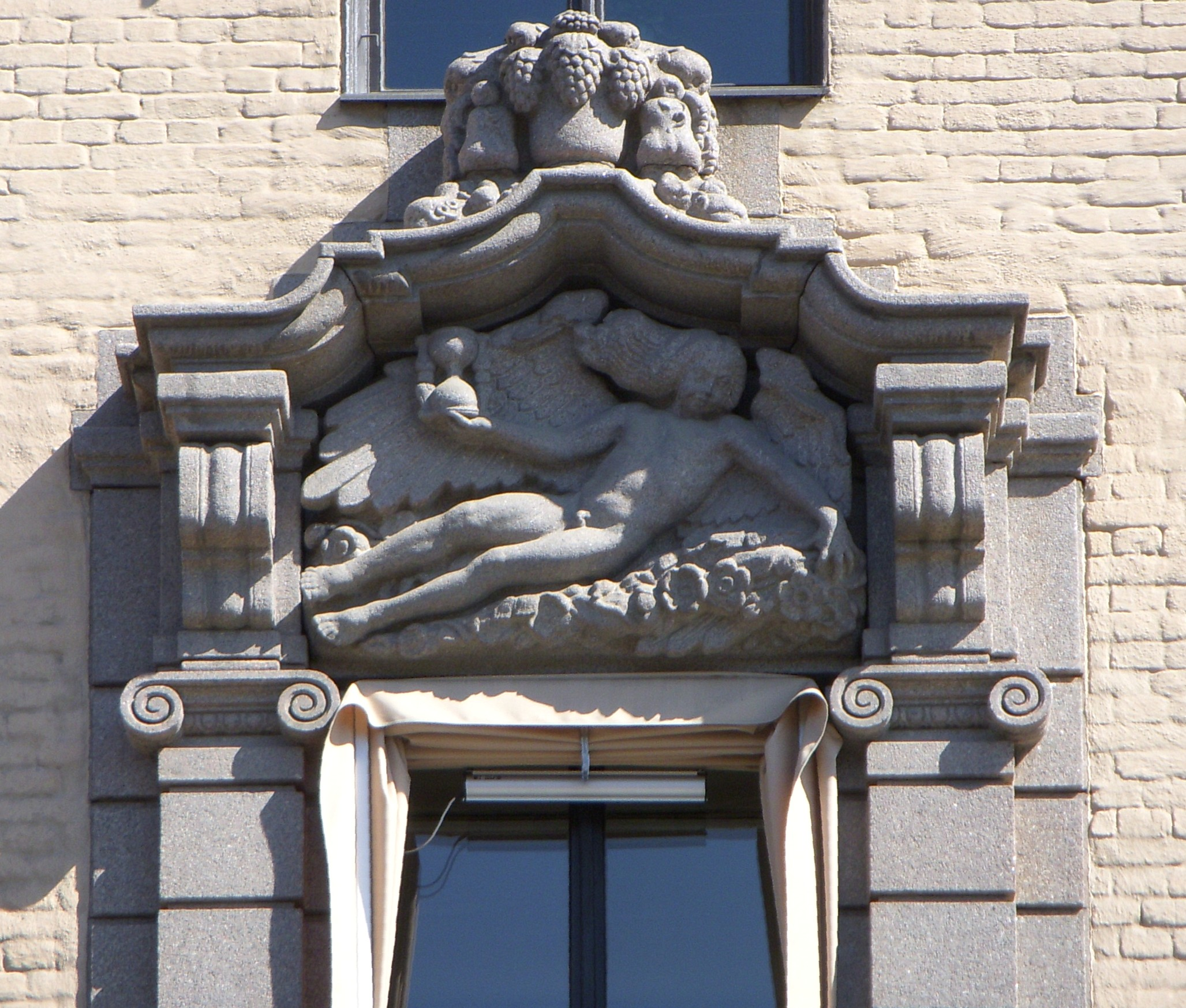 Thulehuset vid Kungsträdgårdsgatan, Stockholm, detalj